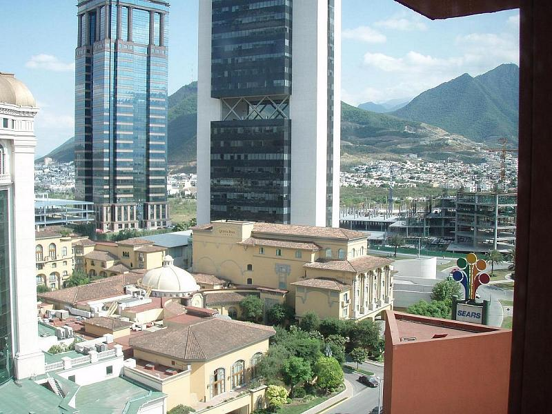 Monterrey, Mexico